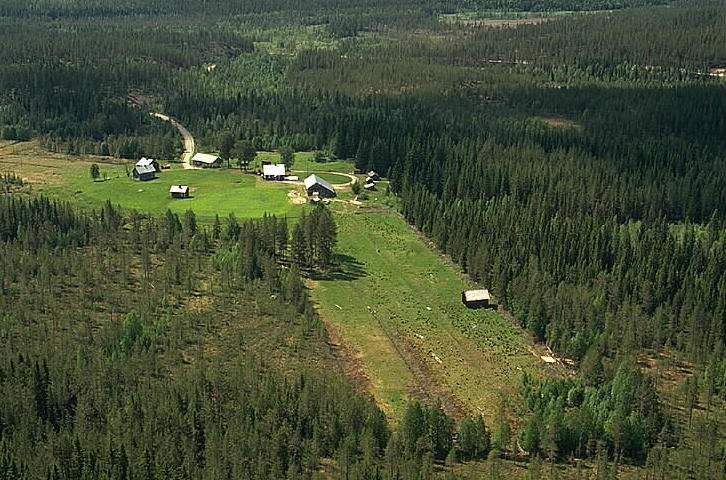 Motiv: Eliasmyren Nyckelord: Flygbilder, Riksintressen Kategori: Torp Eliasmyren